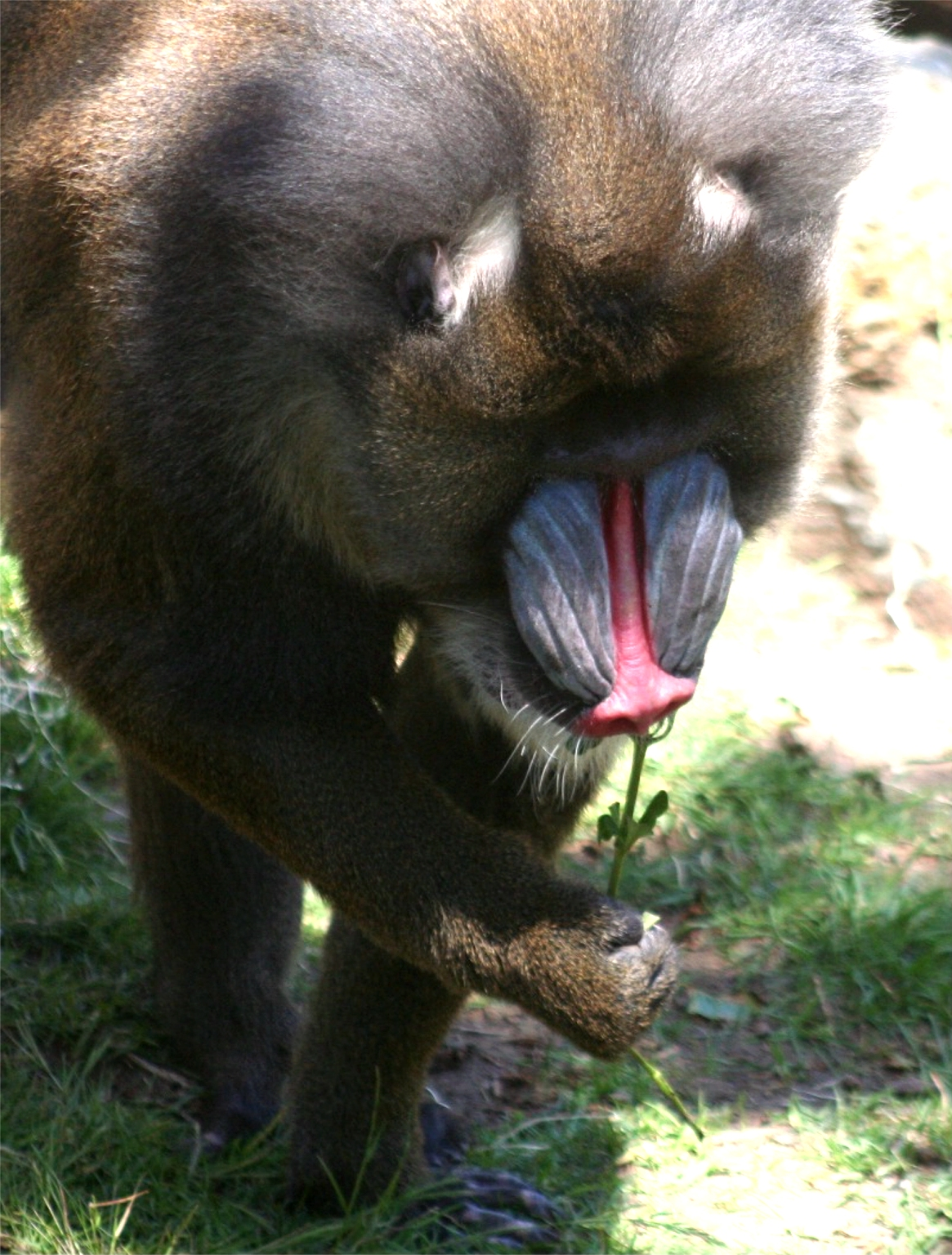 A mandrill smells a flower